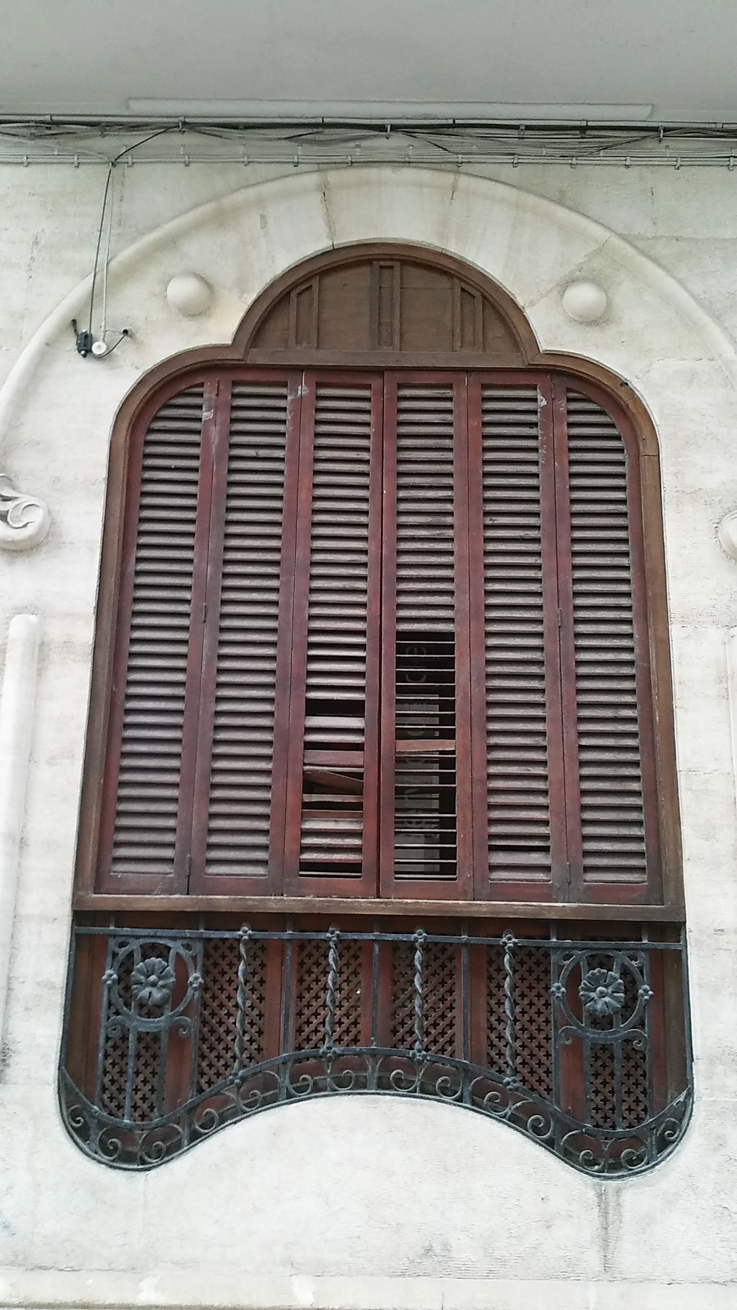 Edifici en Avinguda P. Valencià 30 d'Alcoy.